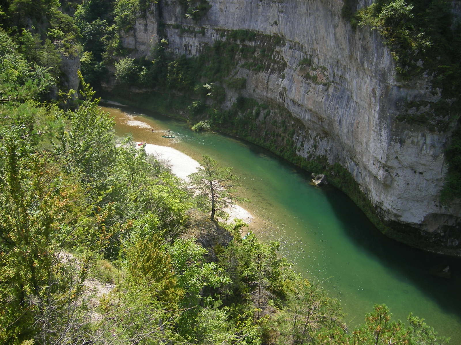 Gorges du Tarn - Détroits (between La Malène and Les Vignes)